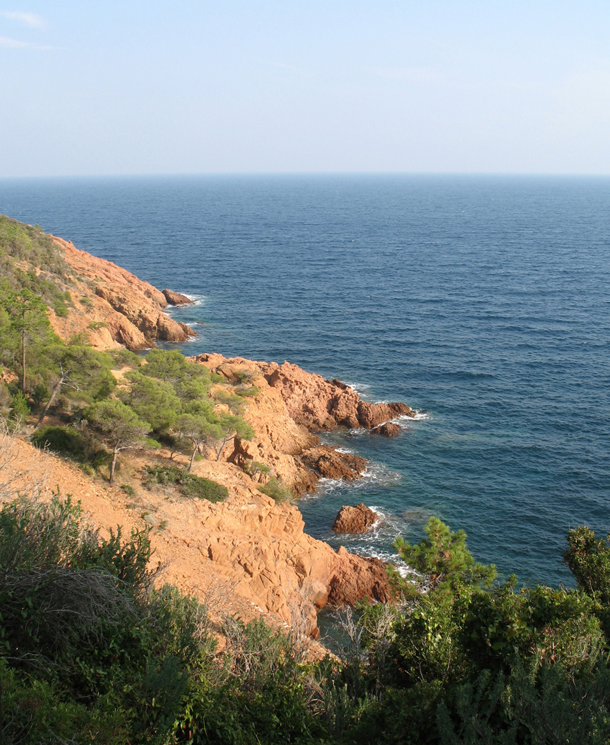 Bord de mer dans le Massif de l'Esterel, France